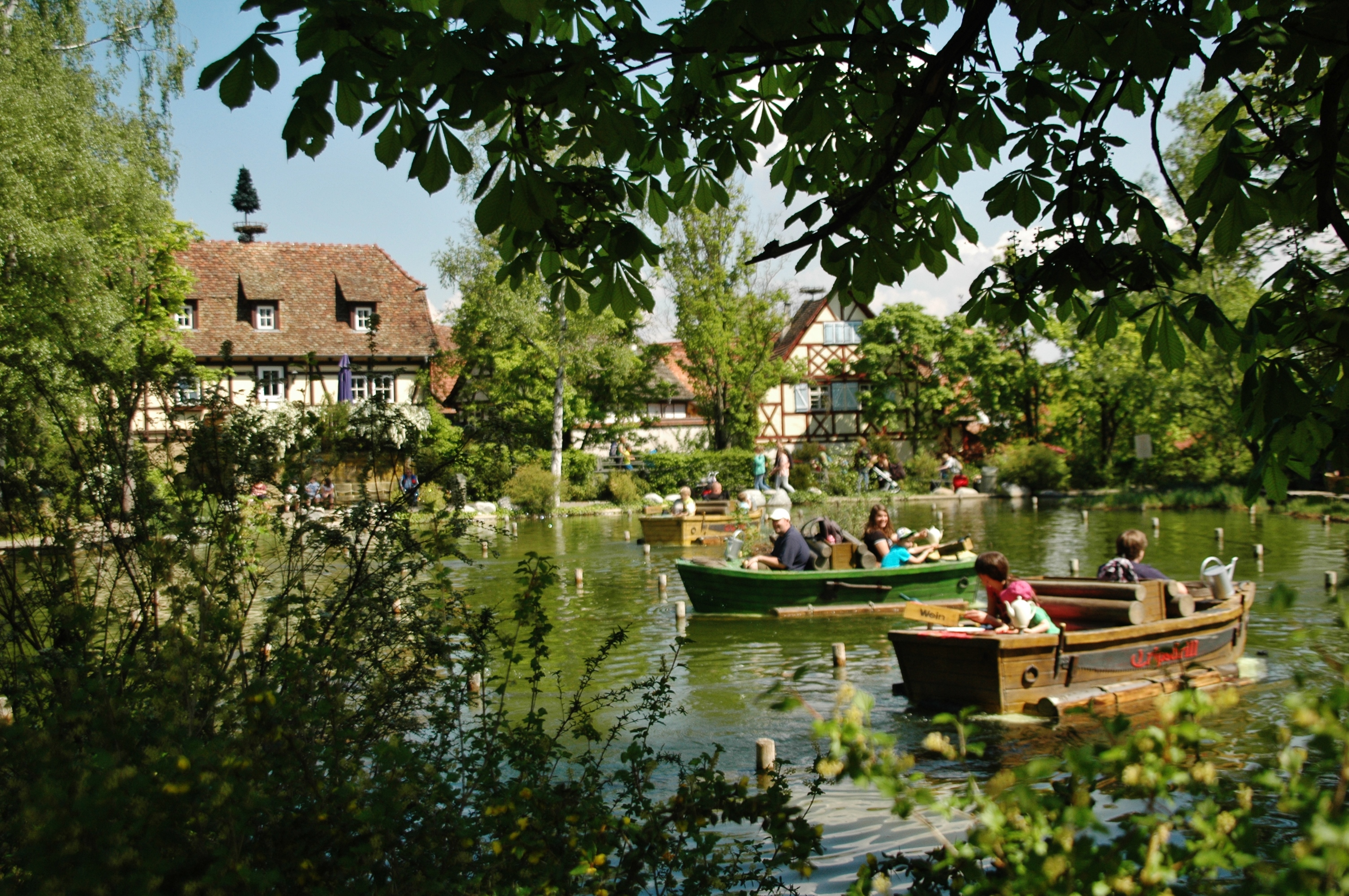 Spritztour für Seefahrer im Tripsdrill - Erlebnispark